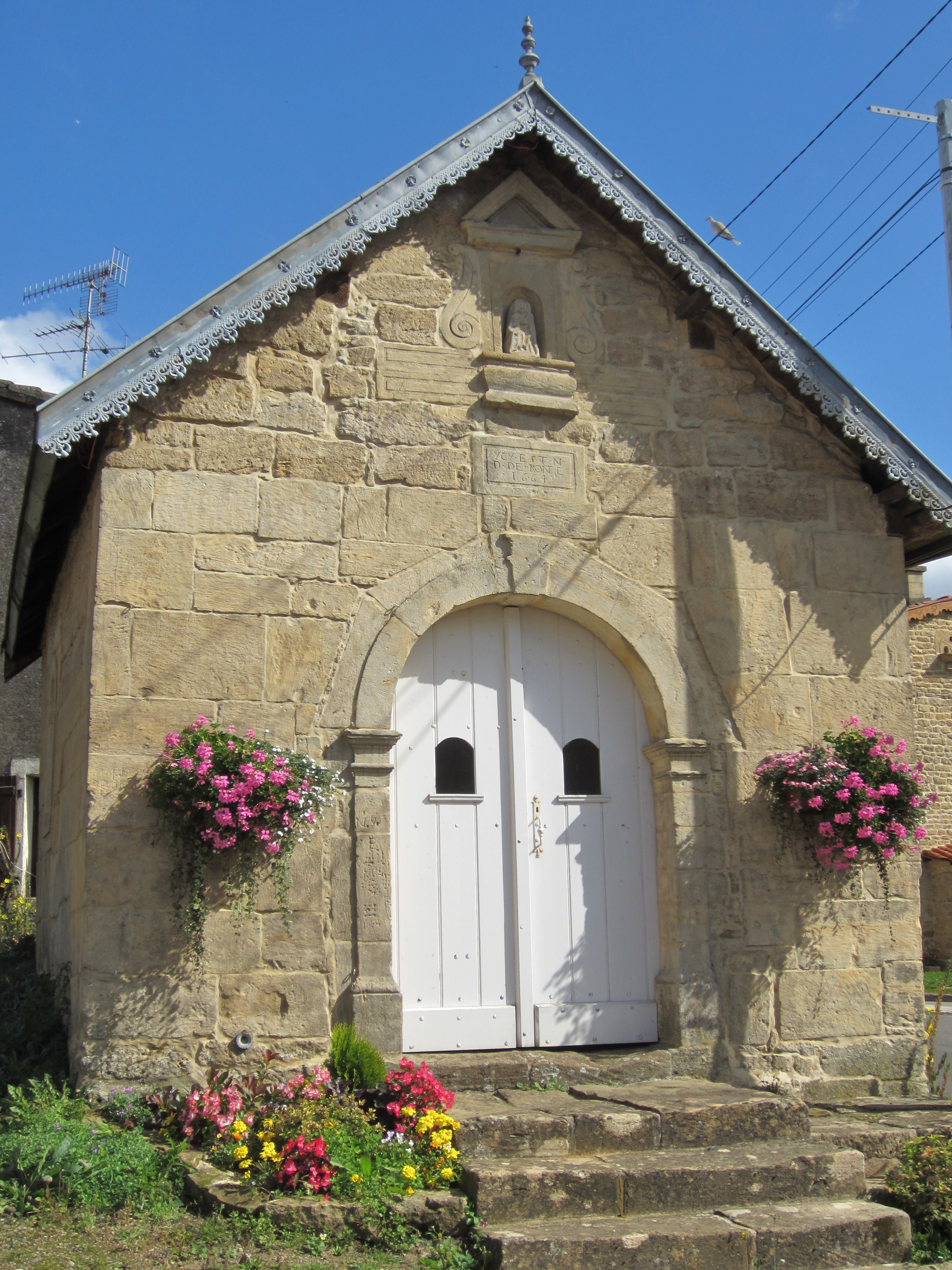 Description chapelle Baslieux Date23 September 2011Sourcemon appareil photoAuthorAimelaimePermission (Reusing this file) chapelle Baslieux